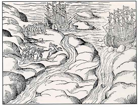 Jens Munks skip i Hudsonstredet. Til venstre ved Caribu Sound, til høyre i Hare Sound. Fra Navigatio Septentrionalis, 1624